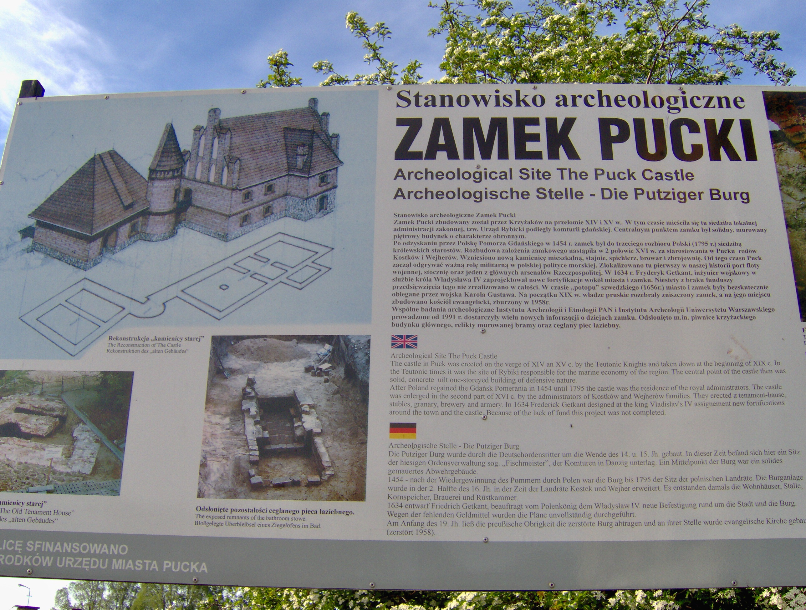 Zamek w Pucku, województwo pomorskie.